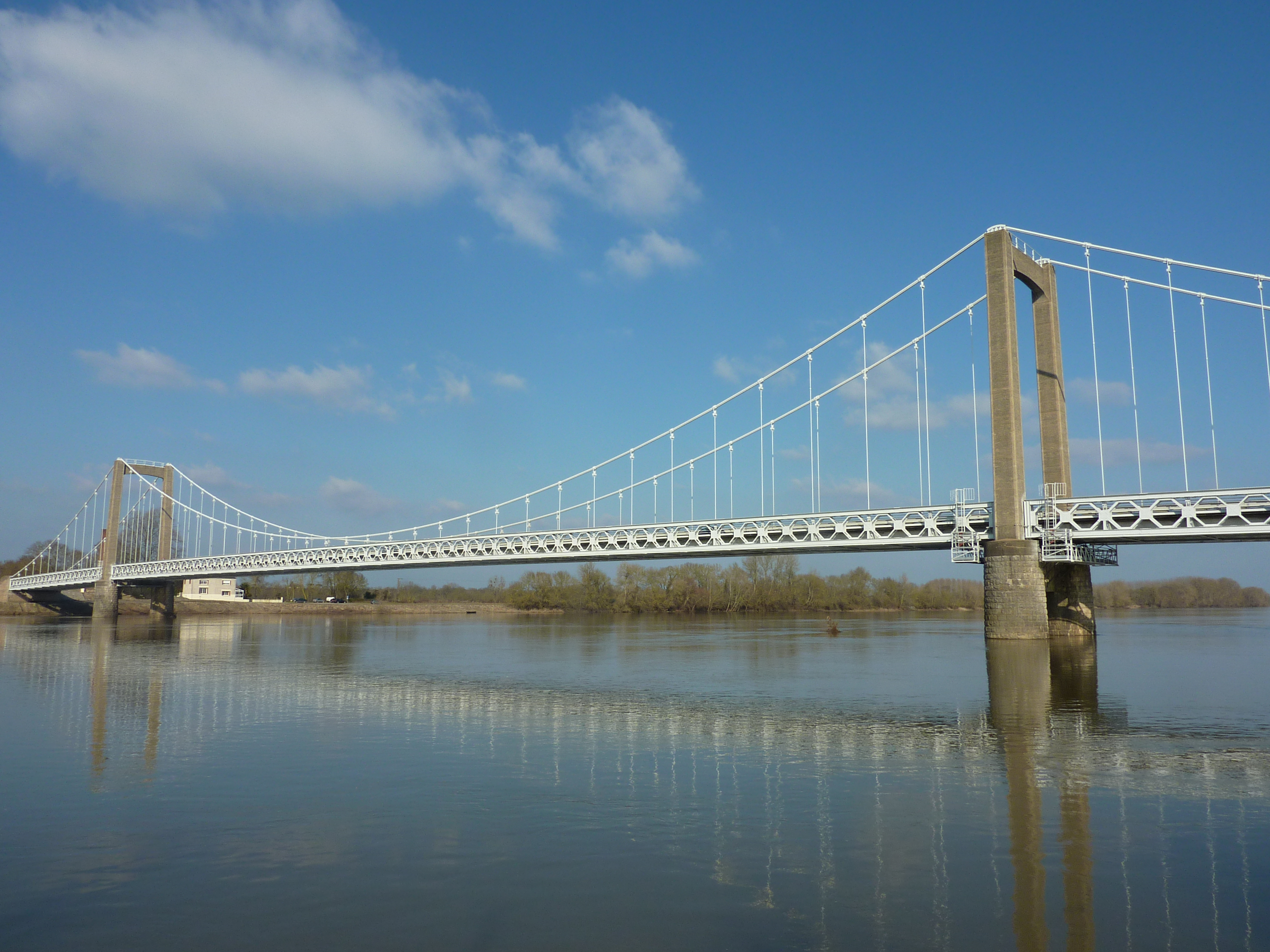 Vue d'ensemble